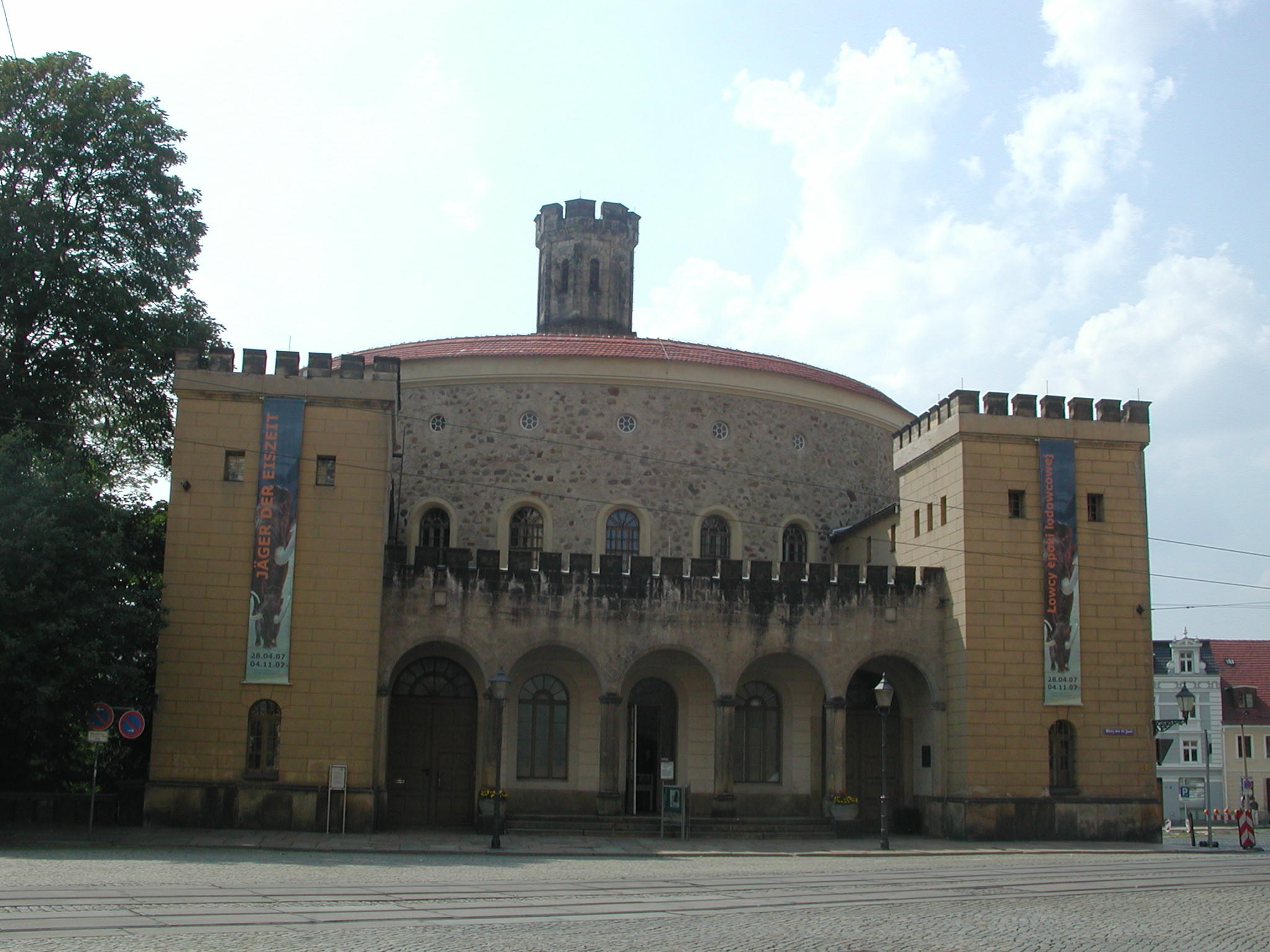 Kaisertrutz von vorne fotografiert